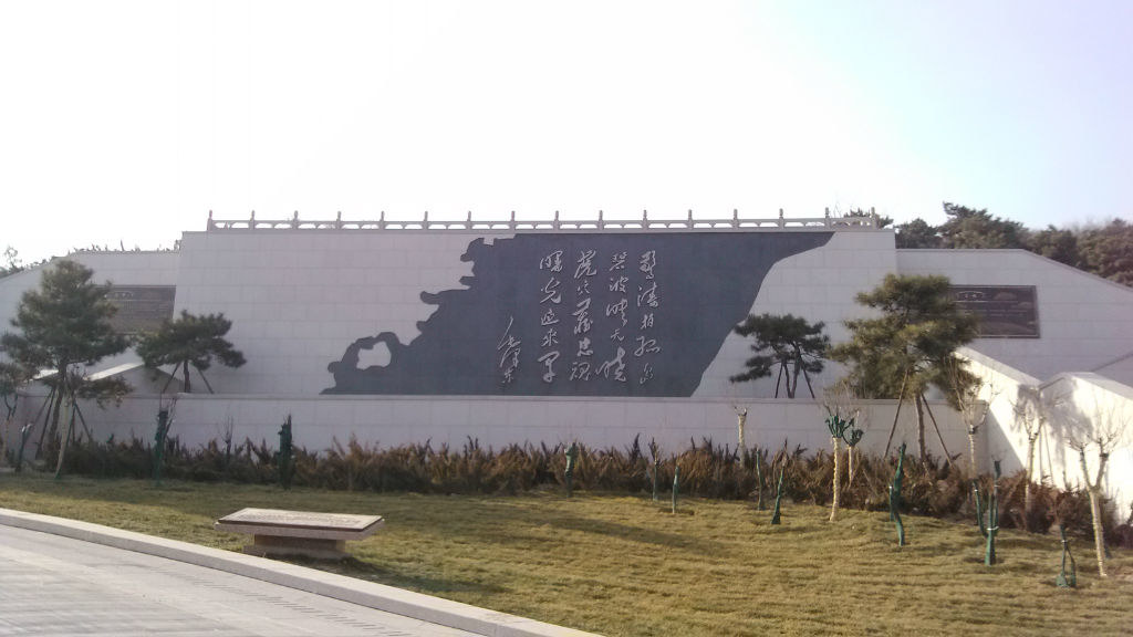 西山无名烈士墓